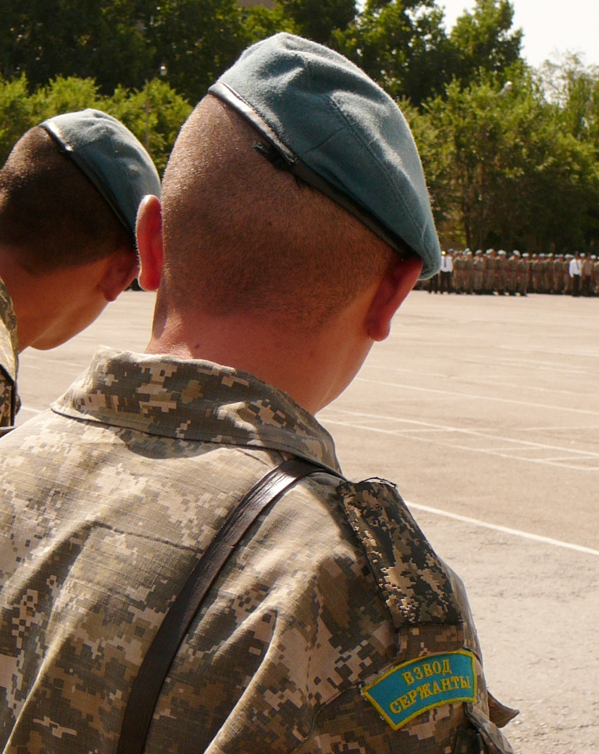 На рукаве военнослужащего 35-й десантно-штурмовой бригады, пришита нашивка с текстом на казахском "Взвод Сержанты", что означает по русски - "Сержант Взвода".